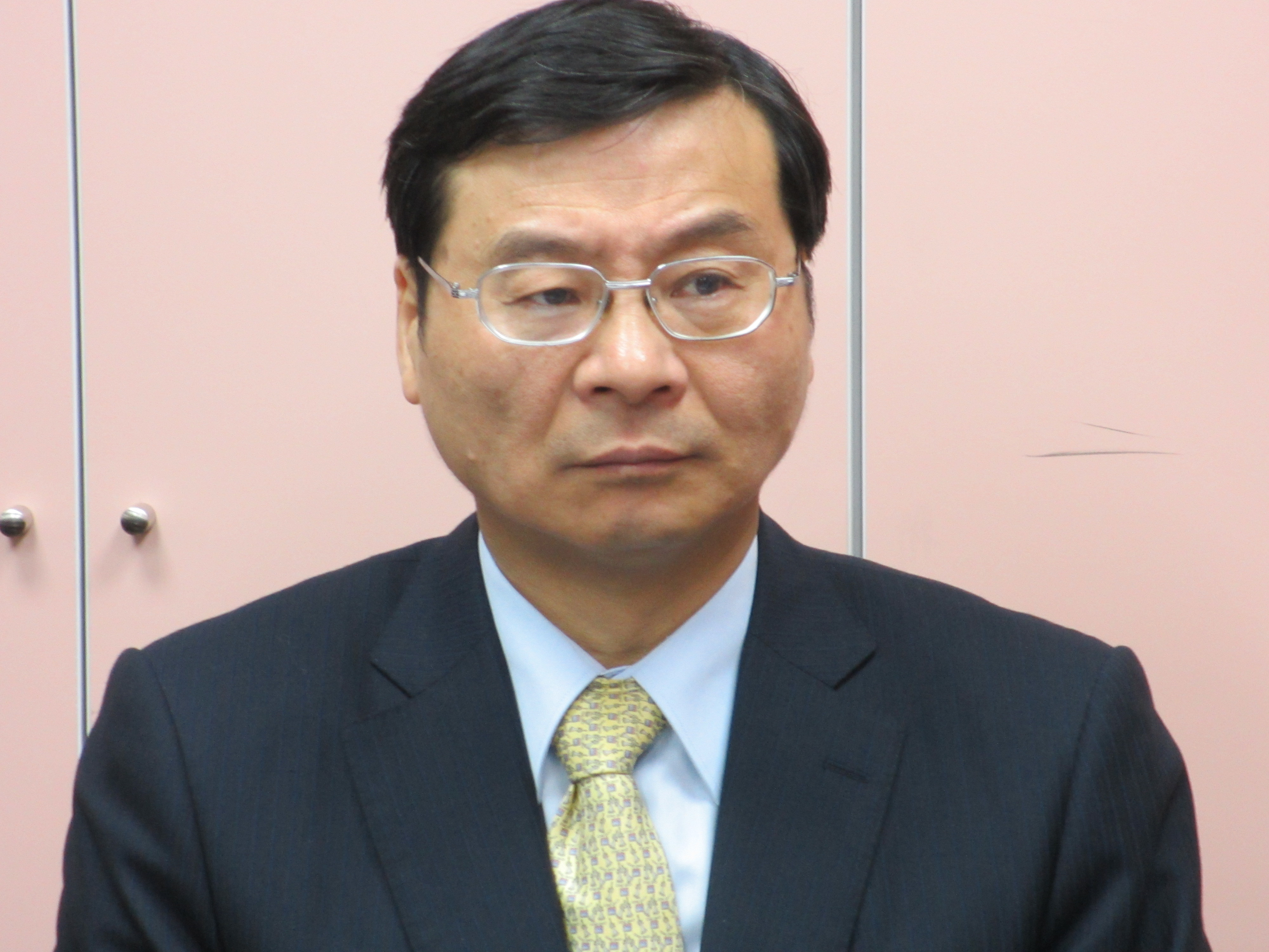 中華民國財政部次長曾銘宗。